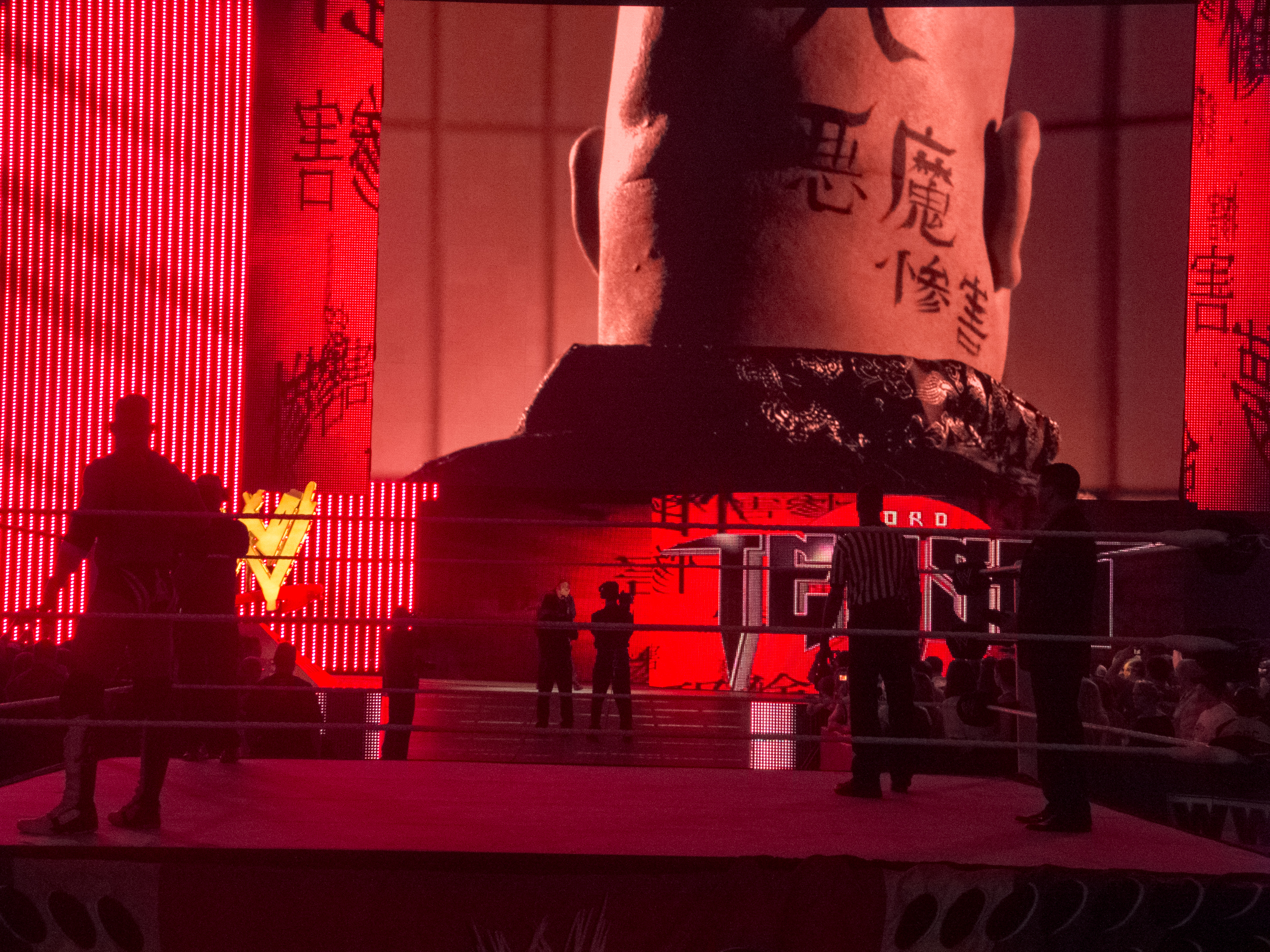 WWE Post-Wrestlemania 28 RAW